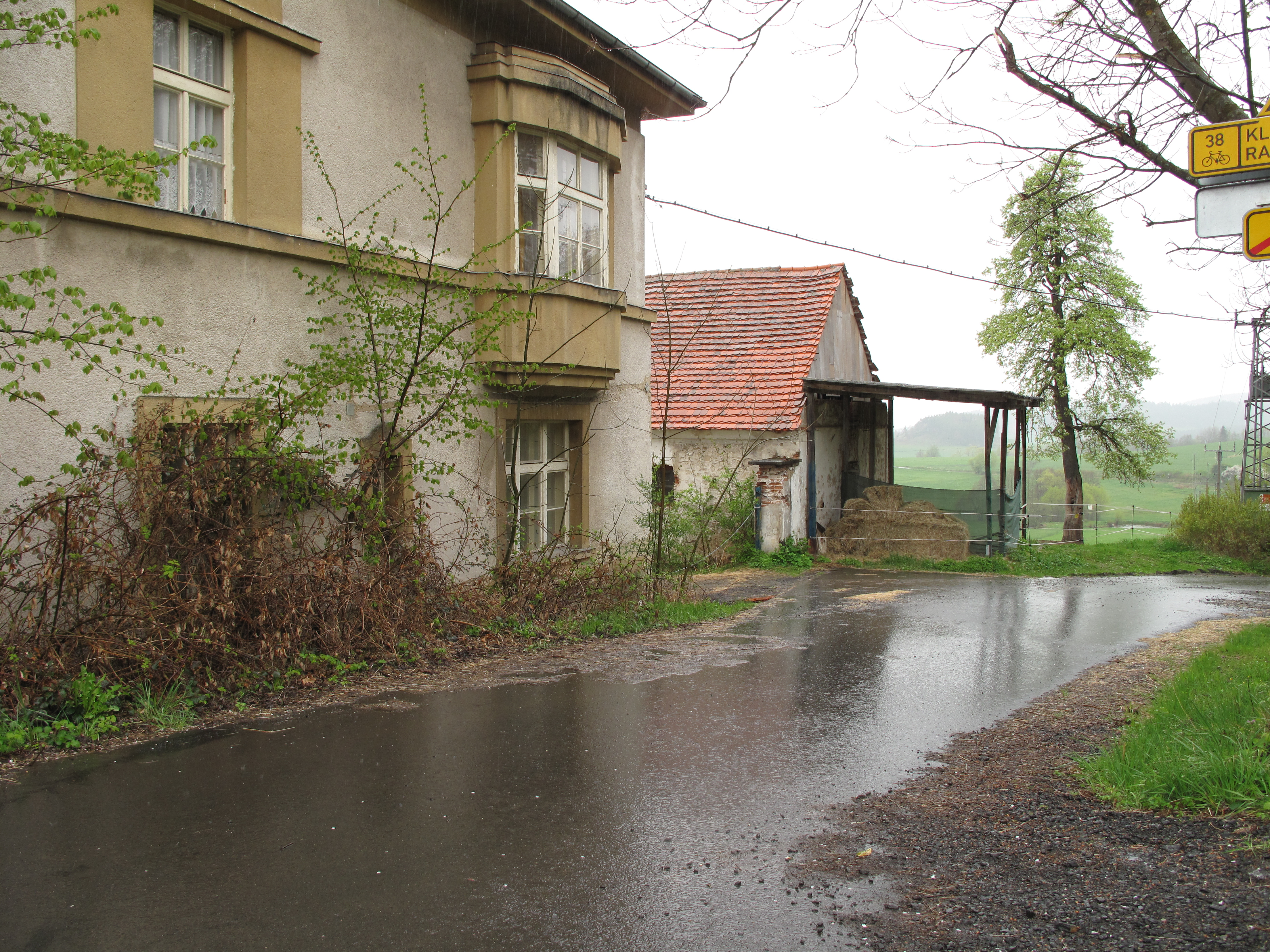 Hubenov (Běšiny). Okres Klatovy, Česká republika.